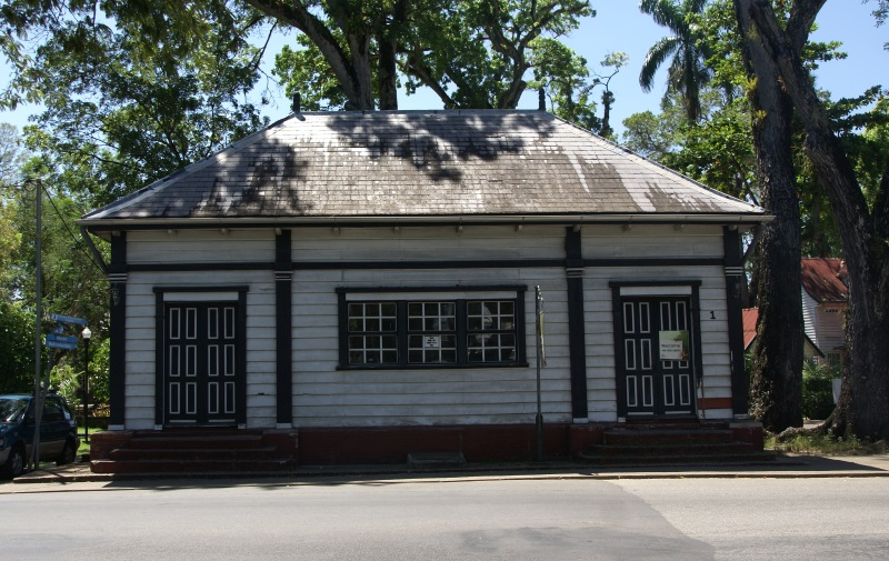 Abraham Crijnssenweg-Onafhankelijkheidsplein, Paramaribo, Suriname